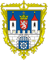 Znak města Kralupy nad Vltavou